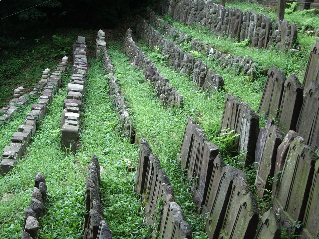 Arigatayama at Inagi, Tokyo